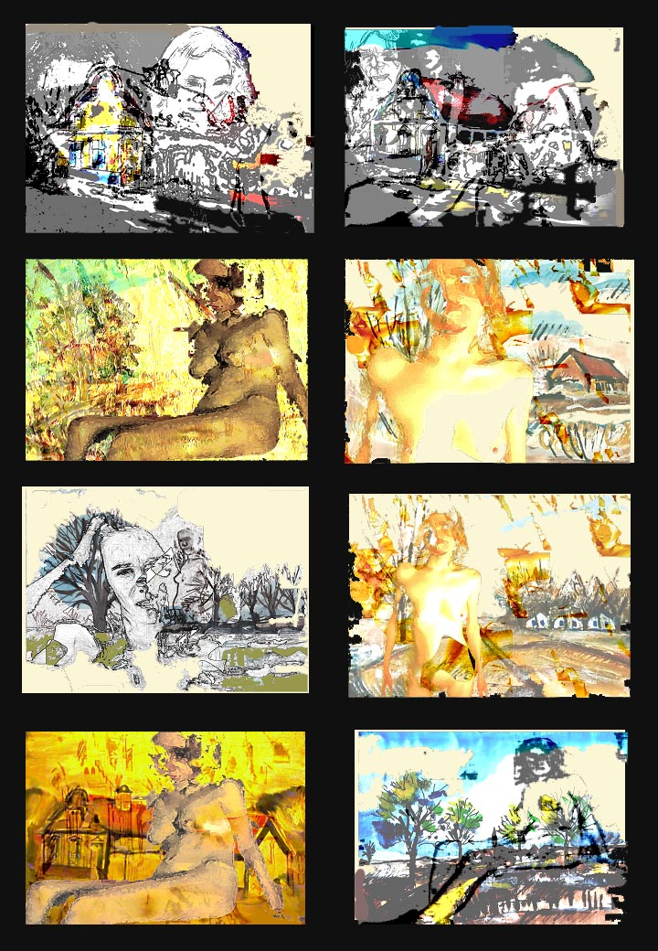 pikcer from Vlastislav Cesnak